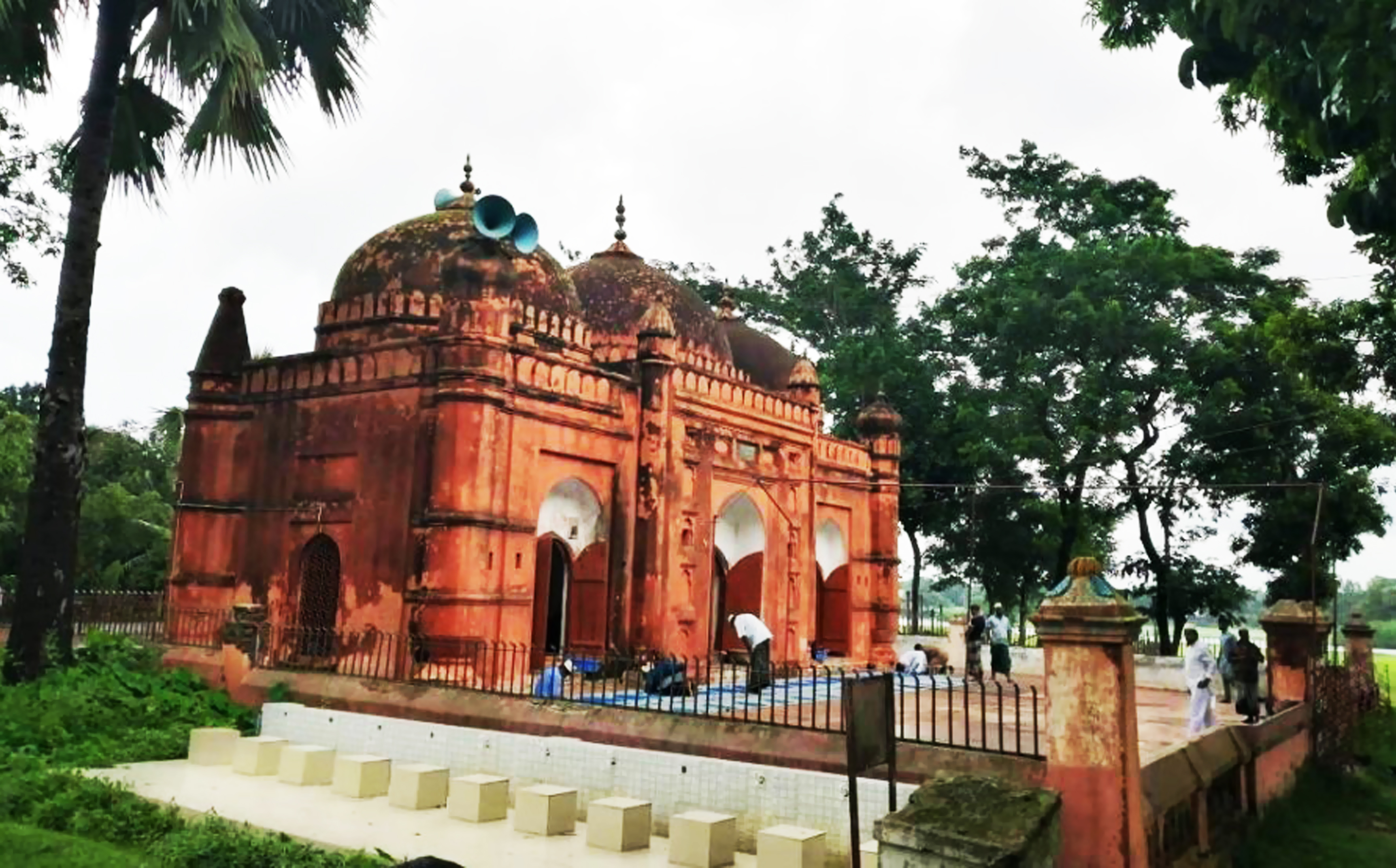 বাংলাদেশের কুমিল্লা জেলার প্রাচীনতম বড় শরীফপুর জামে মসজিদ, ১৭০৬-১৭০৭ সালে নির্মিত হয়